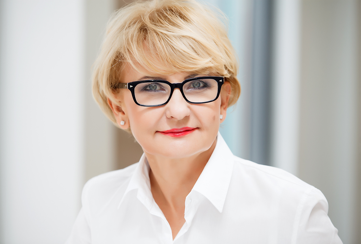 Profesional photo of polish politician Iwona Michalek